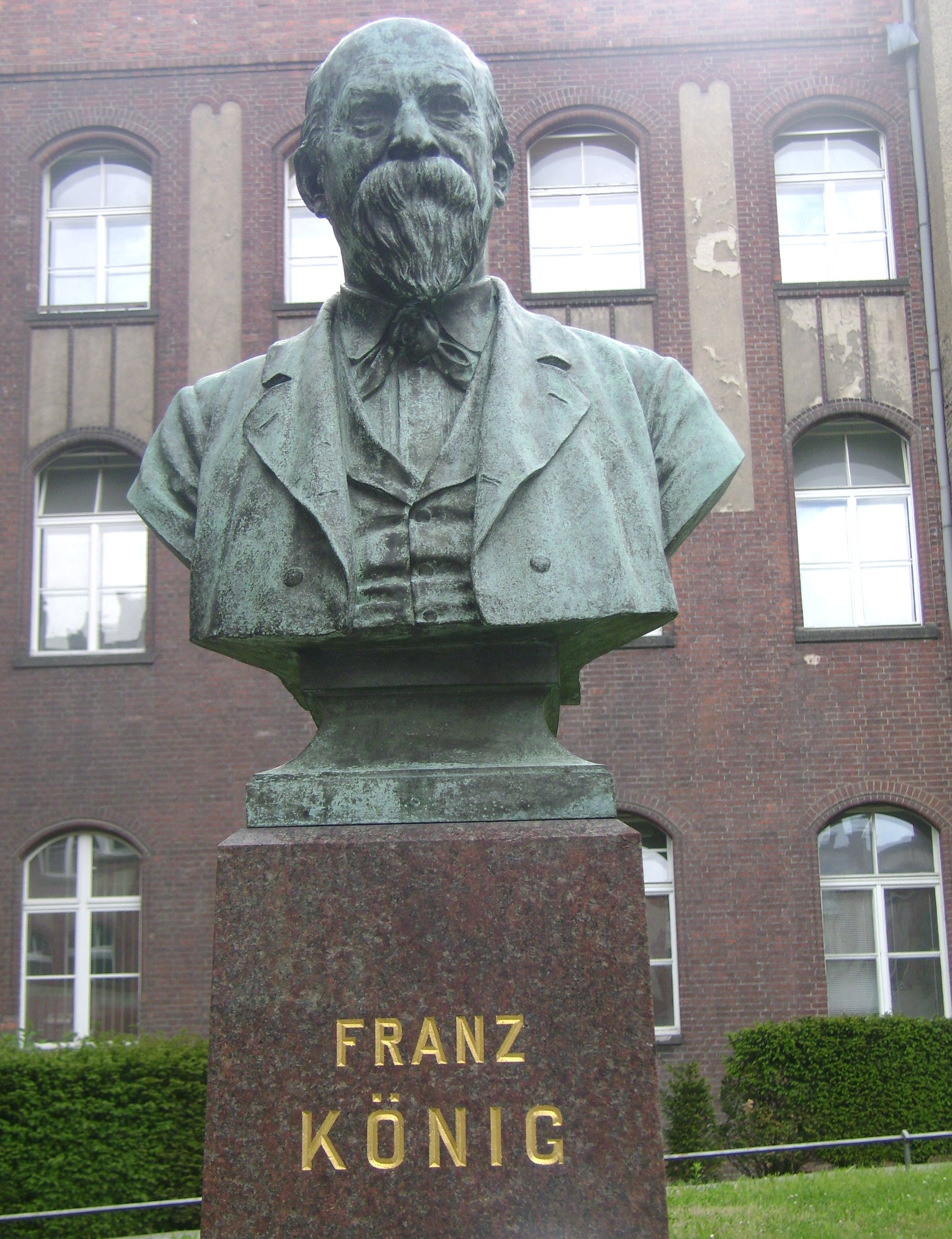 Büste des Chirurgen Franz König im Campus Mitte der Berliner Charité, geschaffen von Carl Ferdinand Hartzer